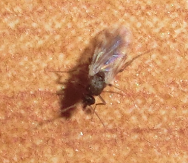 Culicoides impunctatus